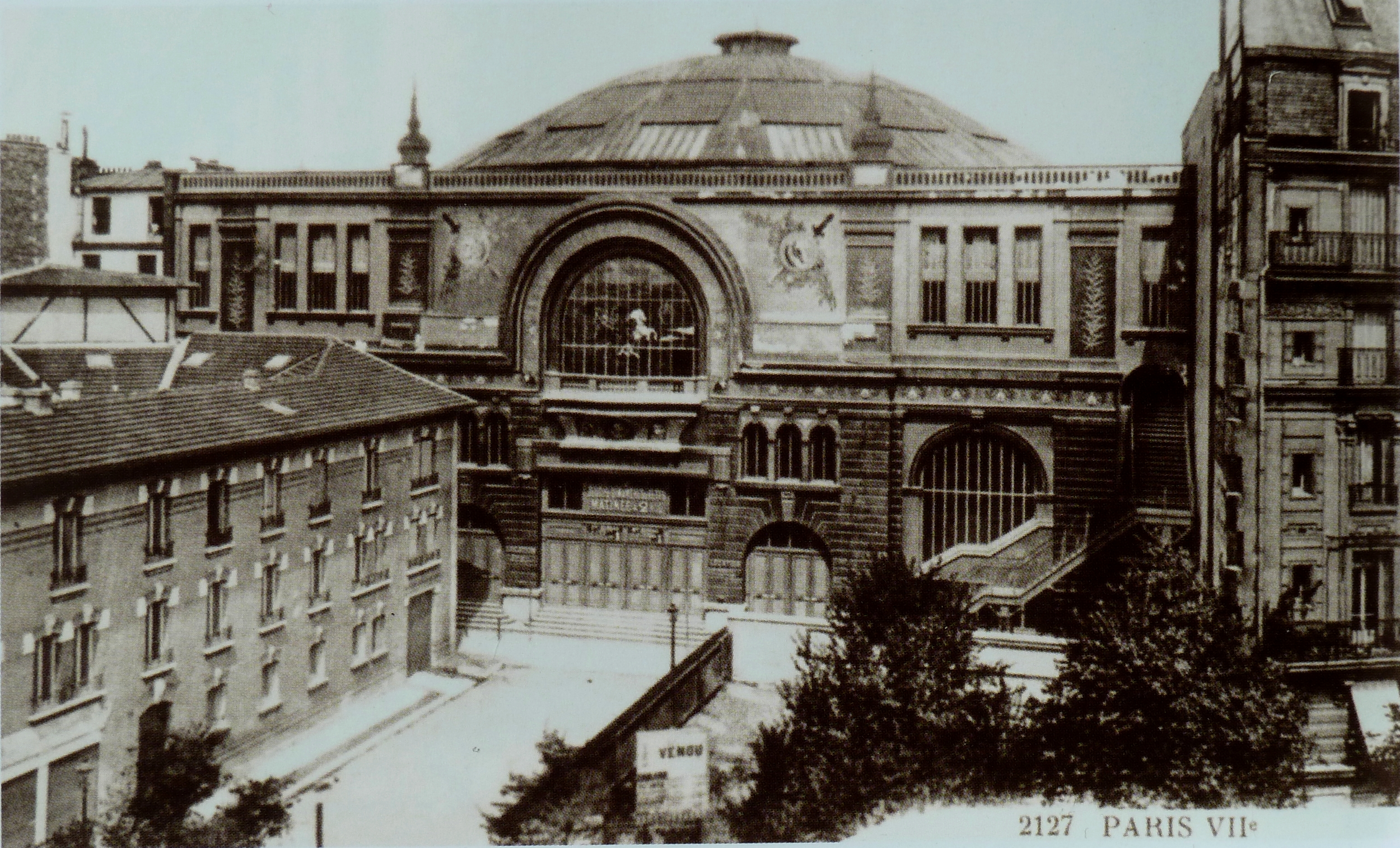 Le cirque Métropole (ou cirque de Paris) (1905-1930). Situé au 18 avenue de la Motte-Piquet (7e arrond. de Paris) avant destruction. Photo anonyme, avant 1910.